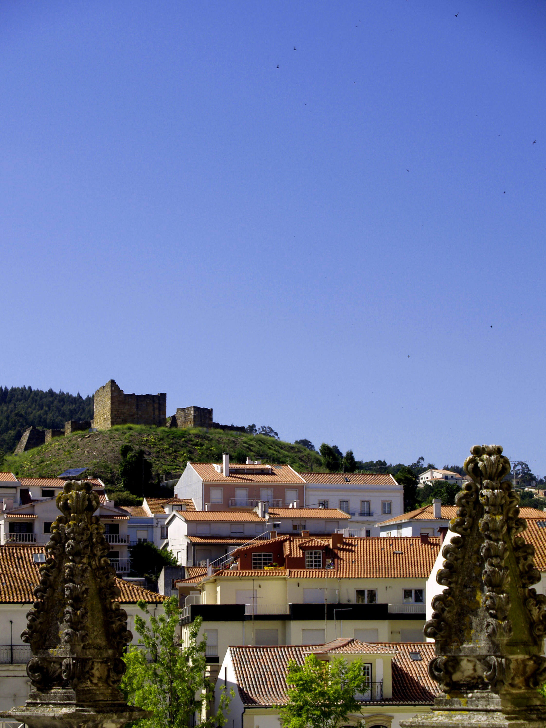 Ruins of Alcobaça Castle, Portugal